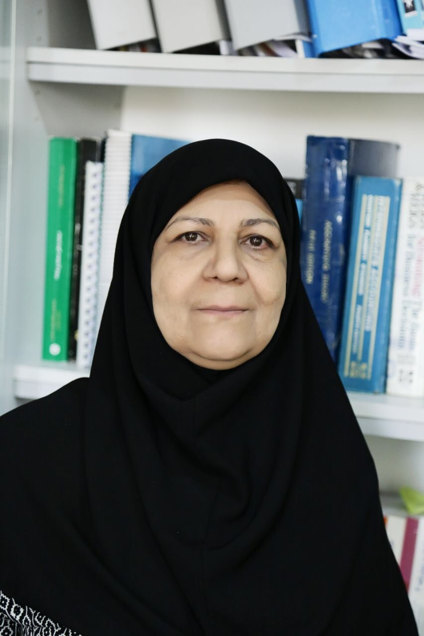 دکتر رضوان حجازی